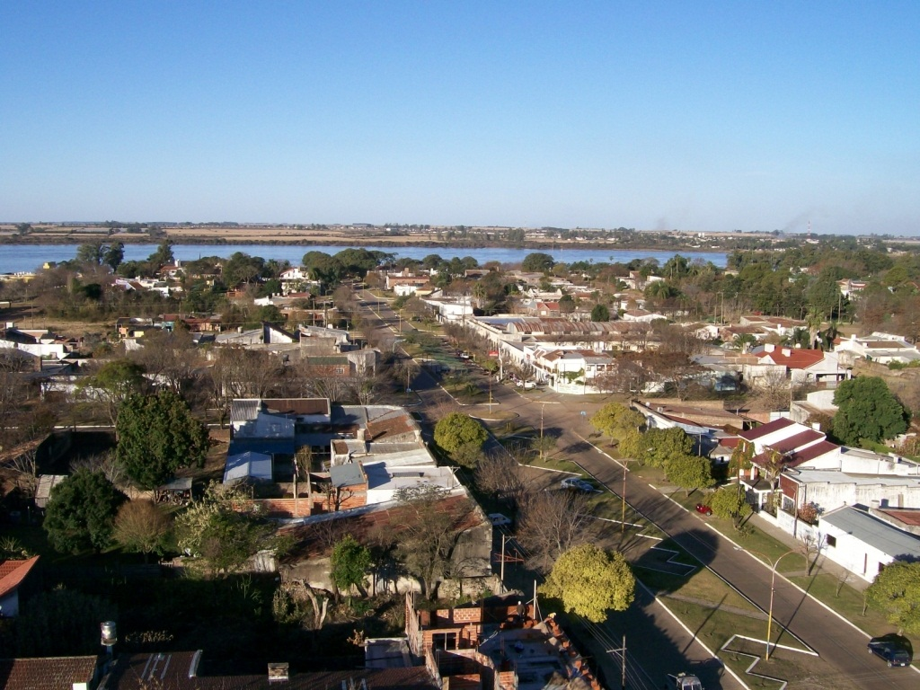 Vista parcial de Monte Caseros (Argentina)